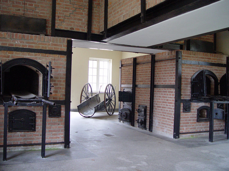 Crematorium in Kamp Vught